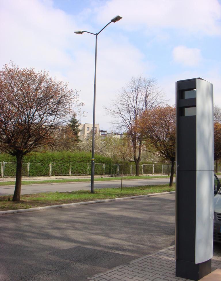 Wieżowy Maszt Fotoradarowy, zdjęcie zrobione w Polsce